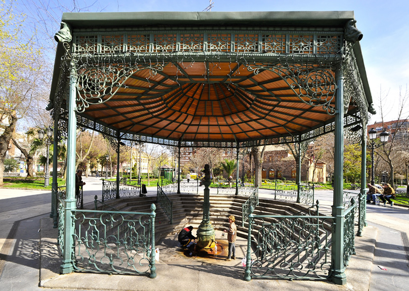 Fuente Agria, de aguas terapéuticas de Puertollano